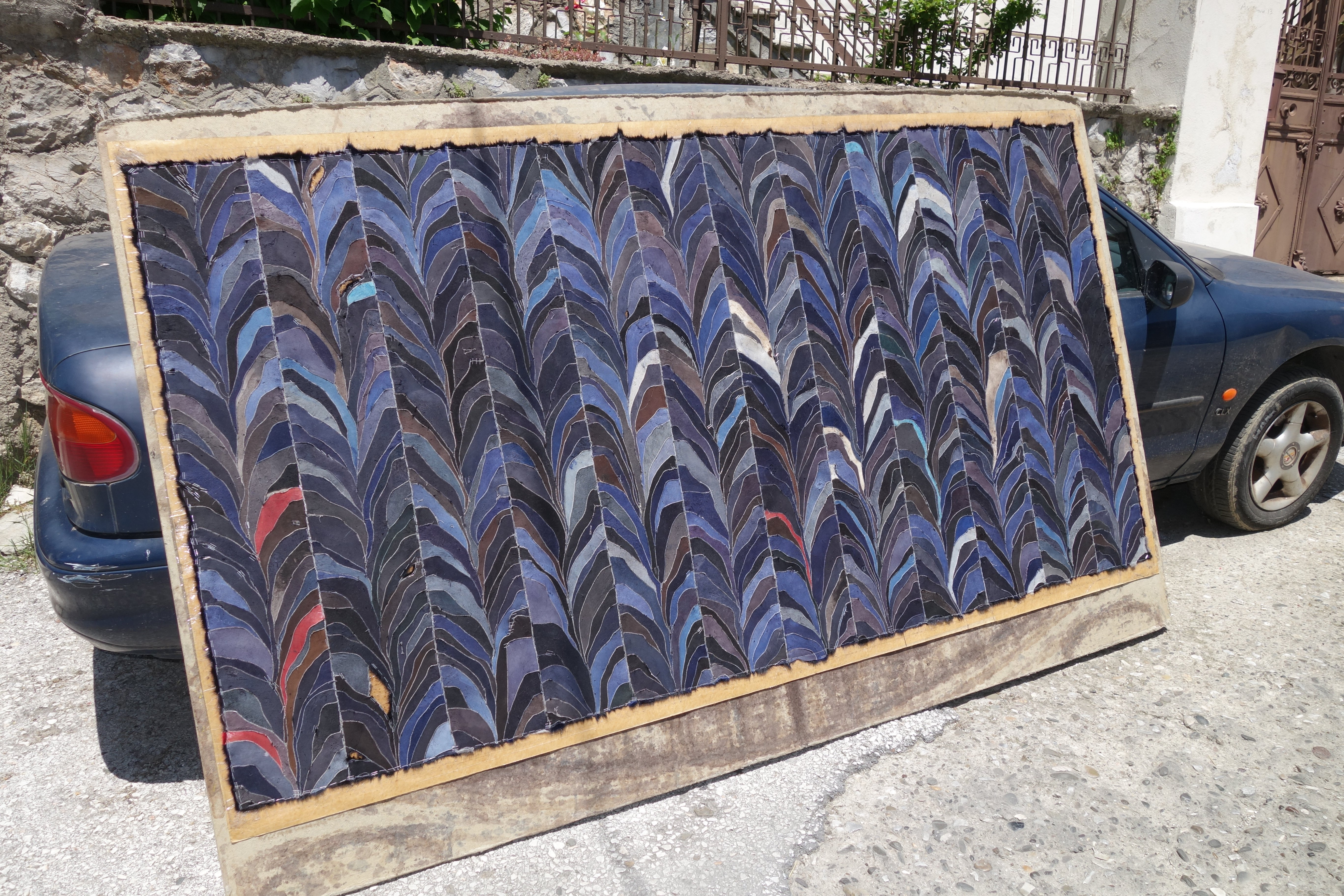 Kürschner in der Stadt Kastoria, Griechenland. Gezwecktes Fuchspfotenbody vor einer Kürschnerwerkstatt. Siehe auch Kürschner in der Präfektur Kastoria und Kürschner in der Stadt Siatista.